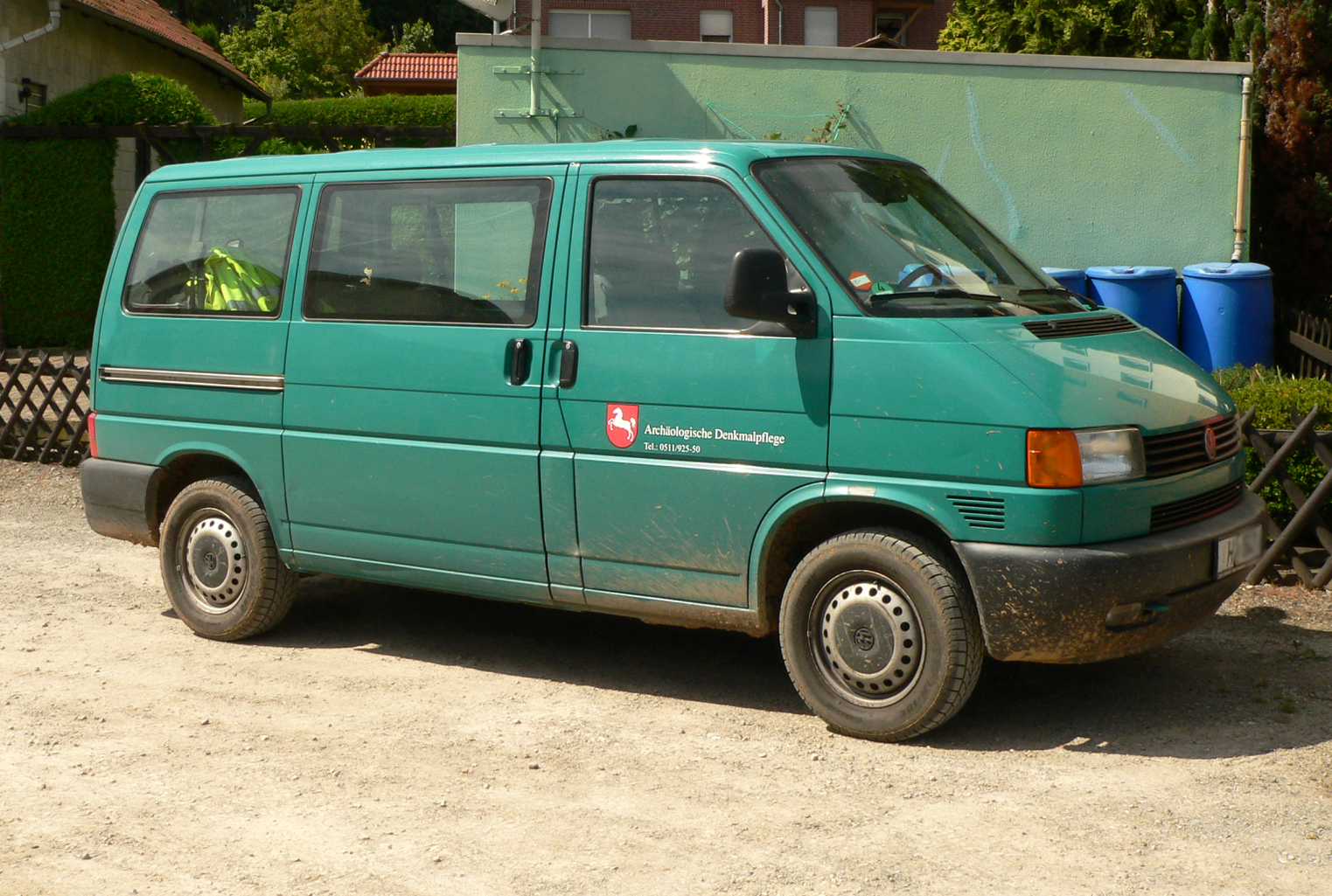 Dienstfahrzeug der Archäologische Denkmalpflege des Niedersächsischen Landesamtes für Denkmalpflege bei der Ausgrabung der Glashütte Klein Süntel